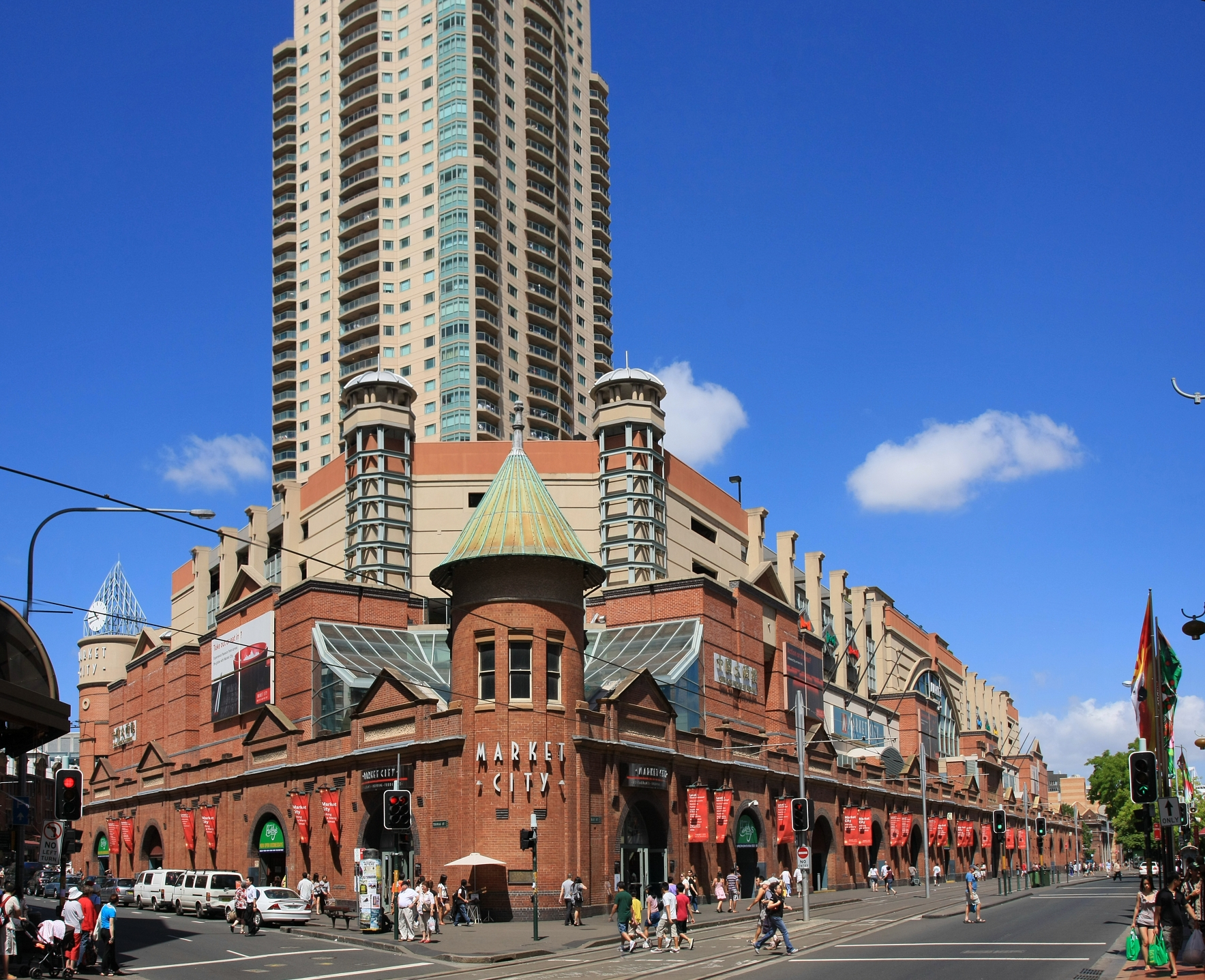 Paddys Market Sydney